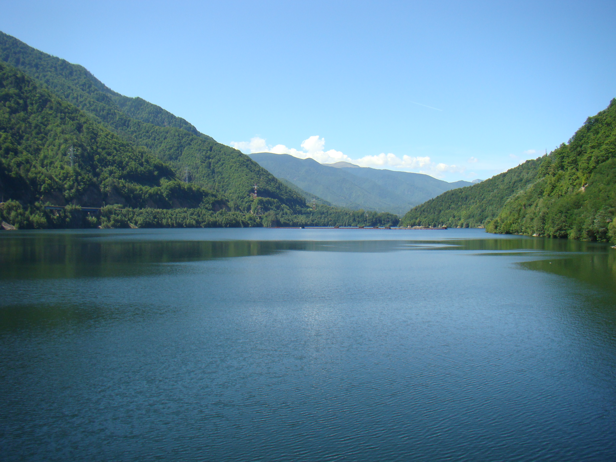 Lacul de acumulare Bradisor